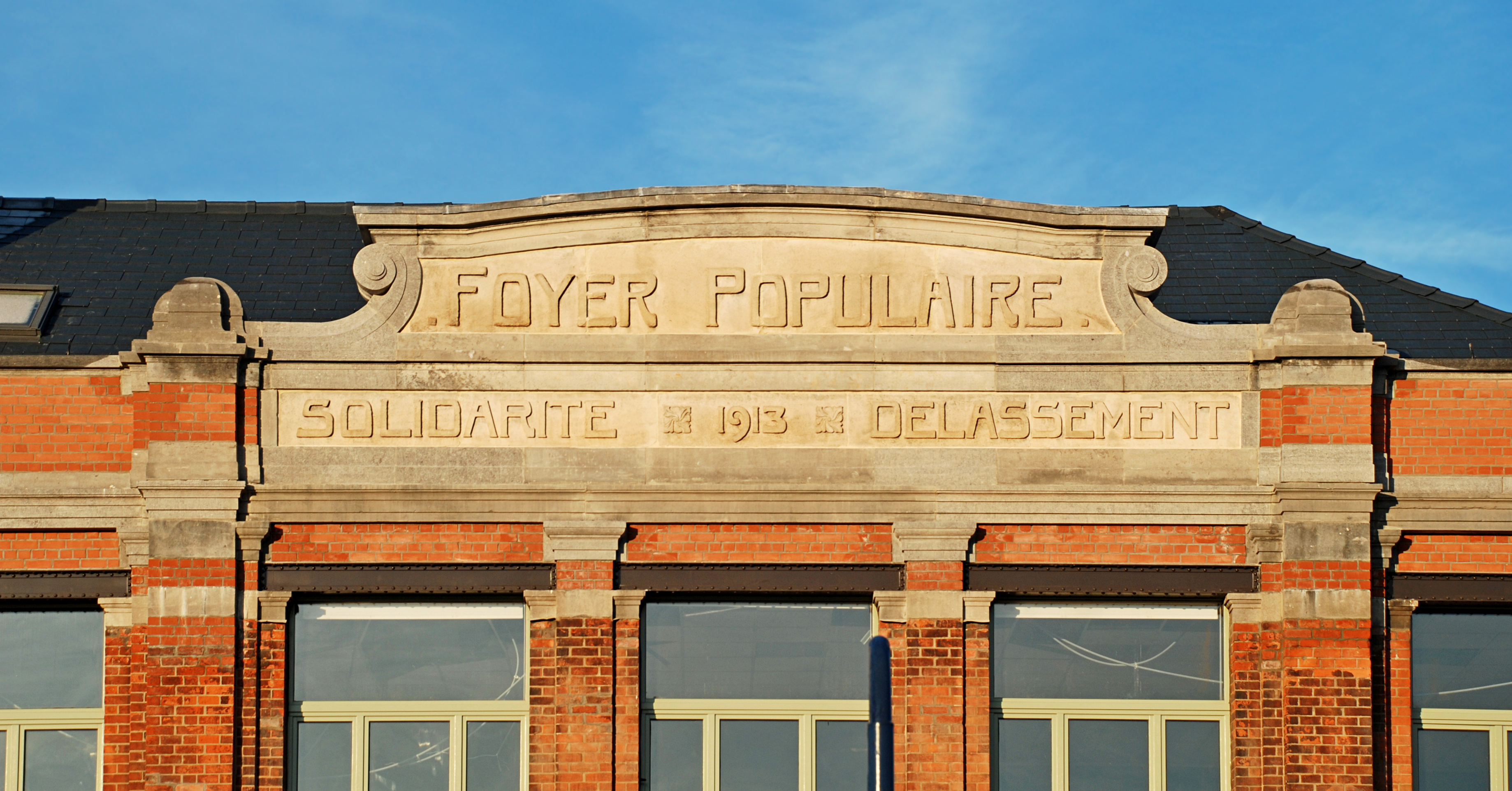 Belgique - Brabant wallon - Foyer populaire de Court-Saint-Étienne (Architecture éclectique, André Dautzenberg, 1913)